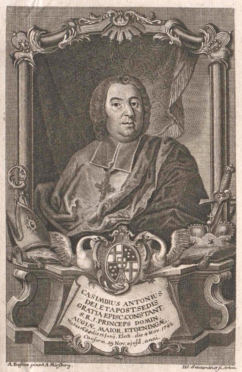 Kasimir Anton von Sickingen, Bischof von Konstanz (1684-1750)